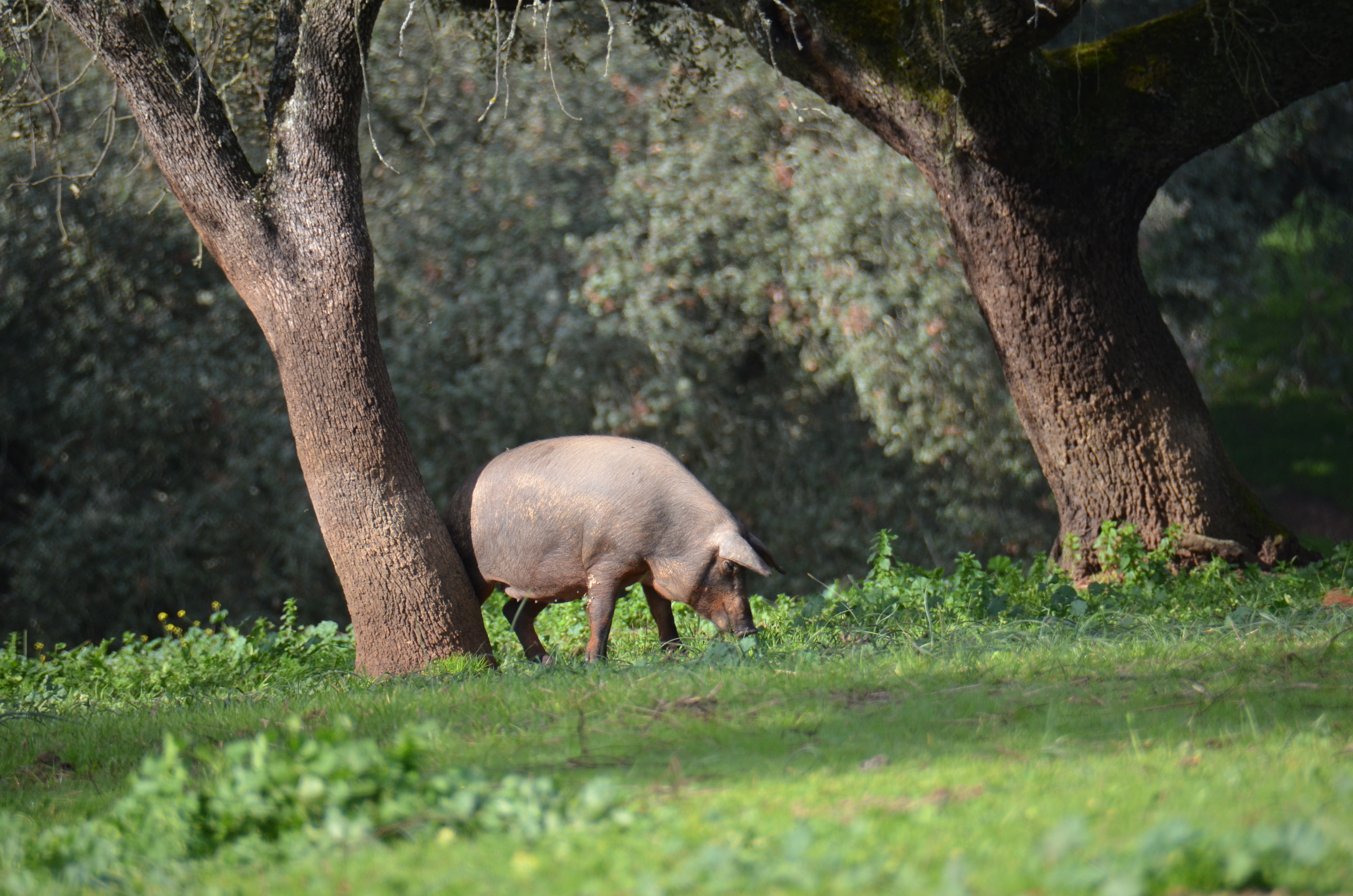 Cerdo en montanera de Guillén. Finca El Tagarráis.